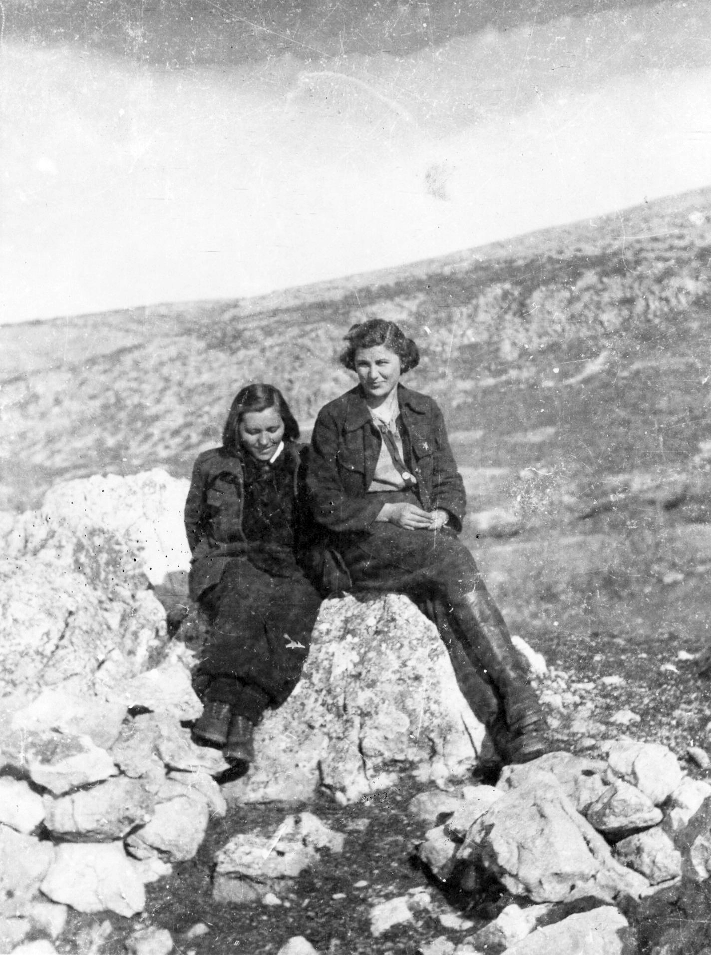 Srpskohrvatski / српскохрватски: Ljubinka Milosavljević i Judita Alargić u okolini Prozora u vreme četvrte neprijateljske ofanzive.